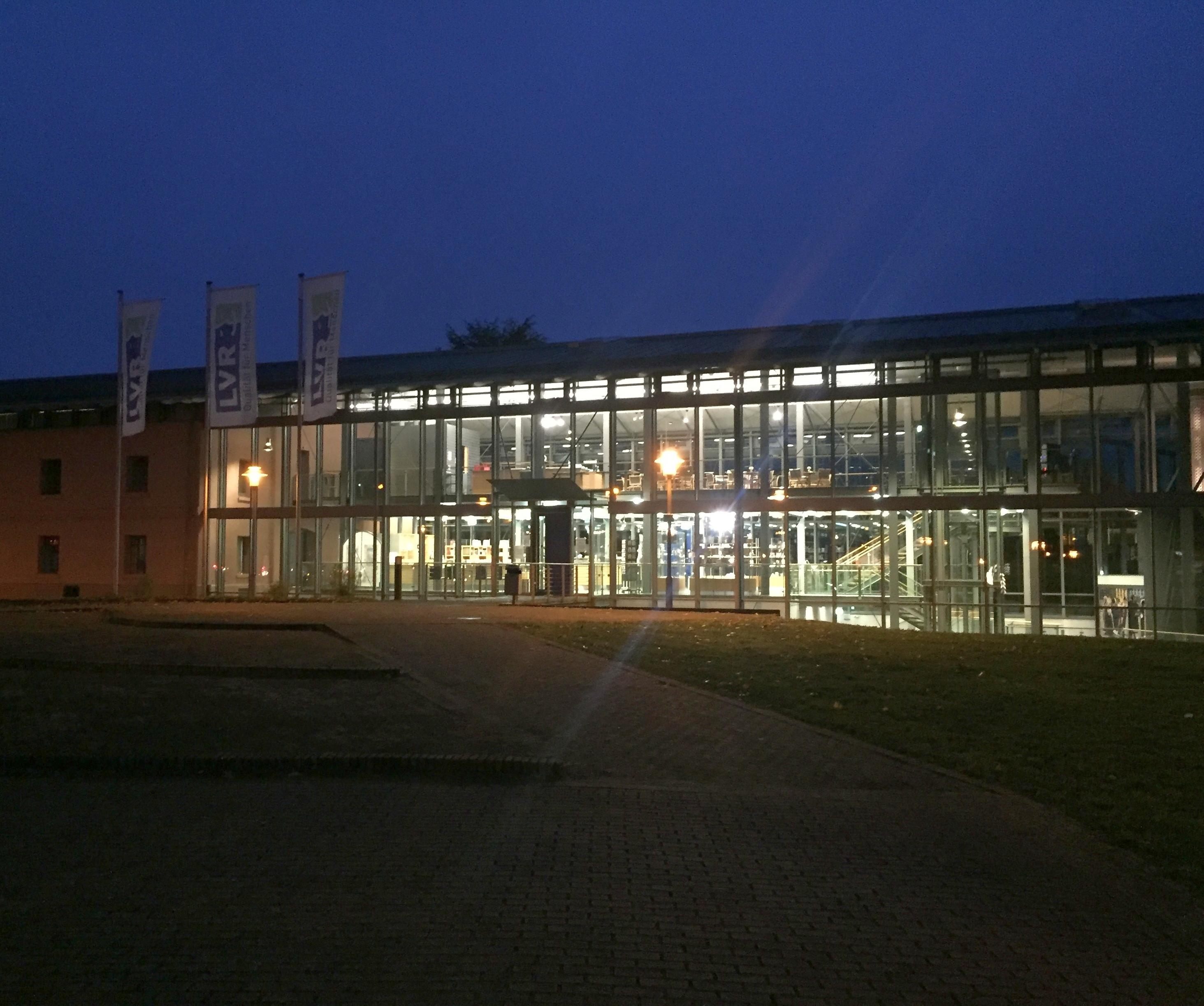 Außenaufnahme des Museums.